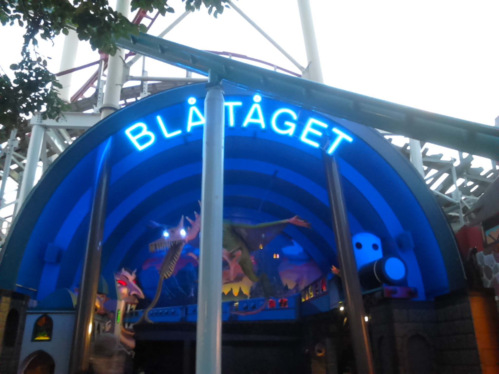 Åkattraktionen Blå Tåget på Gröna Lund.